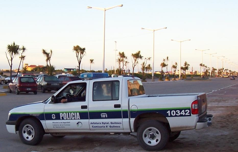 La Policía de la Provincia de Buenos Aires, vigilando las calles de la ciudad de Necochea.